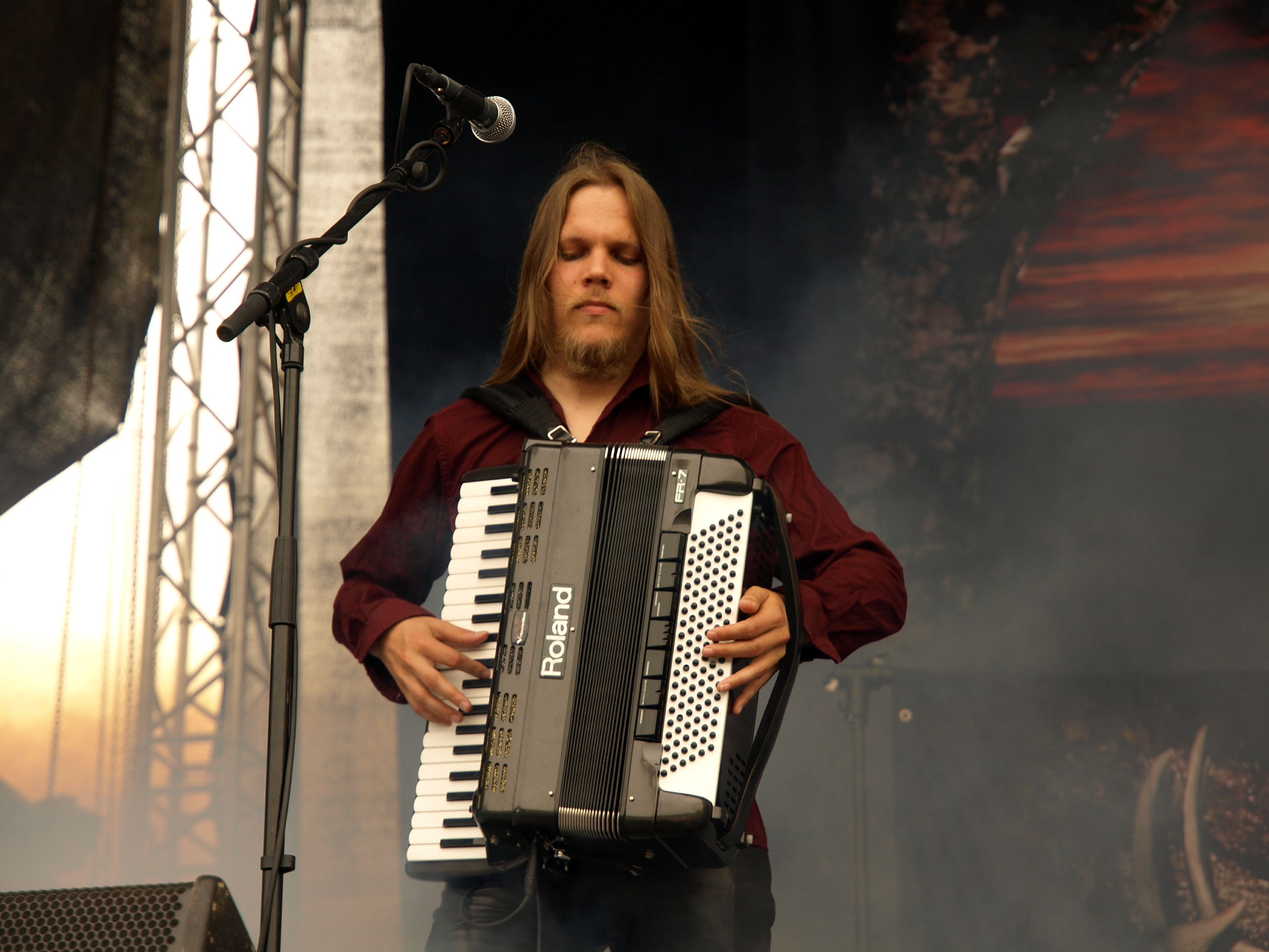 Korpiklaani live am Myötätuulirock 2011